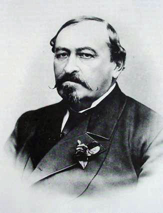 Ernesto II, Duque de Saxe-Coburgo-Gota (1818-1893)